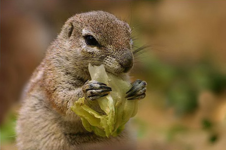 Selbst fotografiert.Aufgenommen mit einer Canon EOS 300D im Grzimek-Haus Frankfurter Zoo. Fotograf/Quelle: Petra Karstedt / Motiv: Borstenhörnchen (Xerus rutilus)